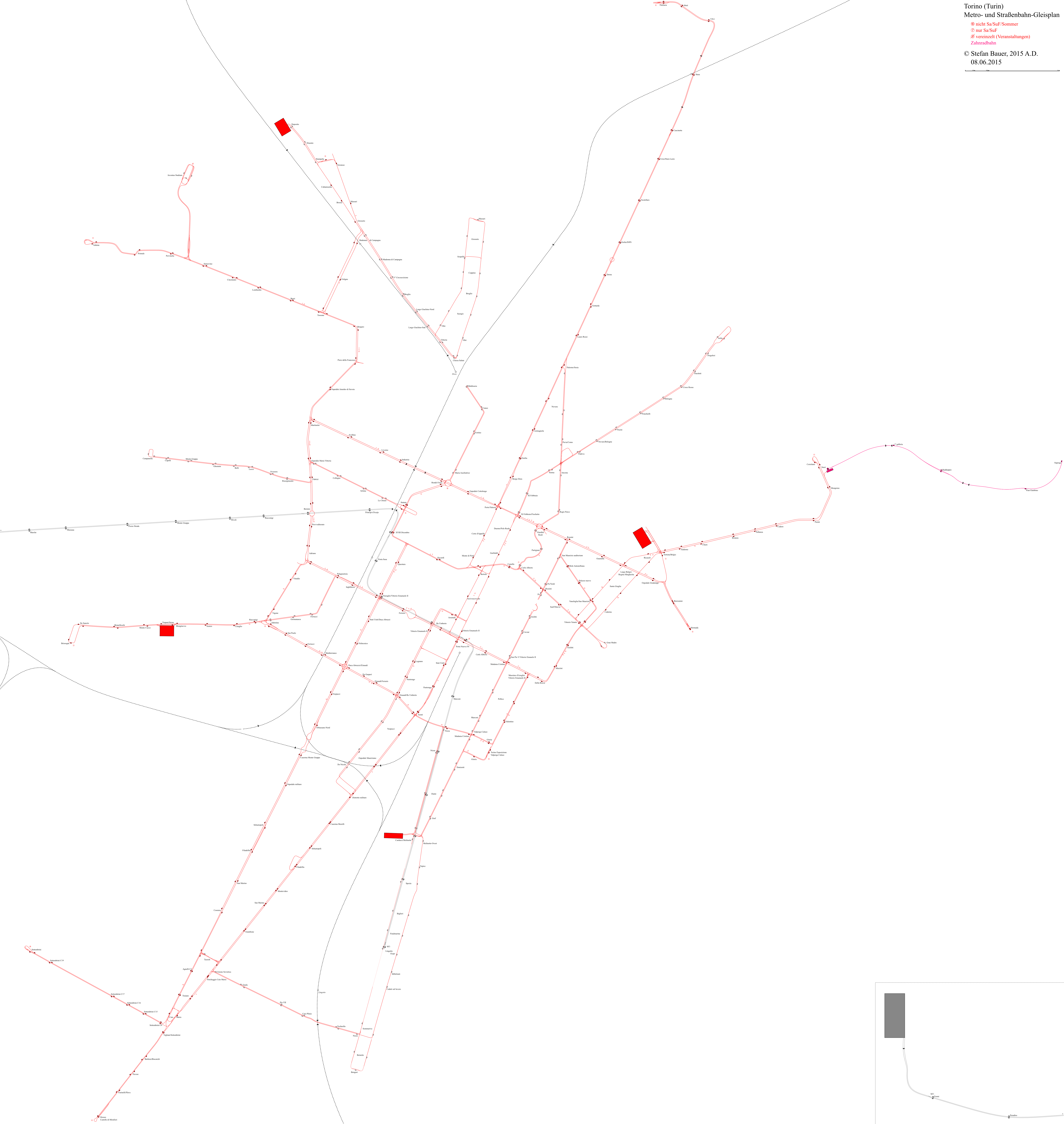 Mappa dei binari tranviari e della metropolitana di Torino 2015